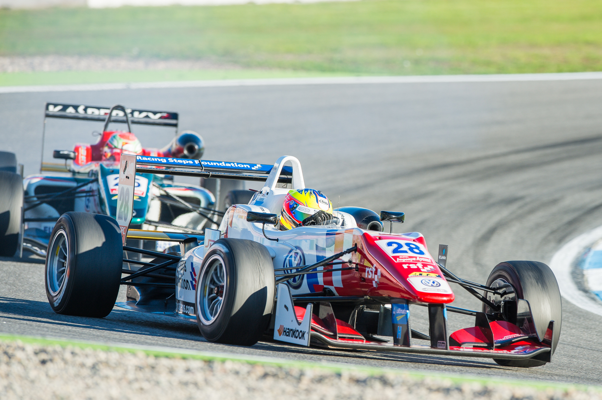 Carlin,DTM,Dallara F312,Deutsche Tourenwagen Masters,F3 FIA European Championship,FIA Formel 3 Europameisterschaft,Hockenheimring,Jake Dennis,Motorsport